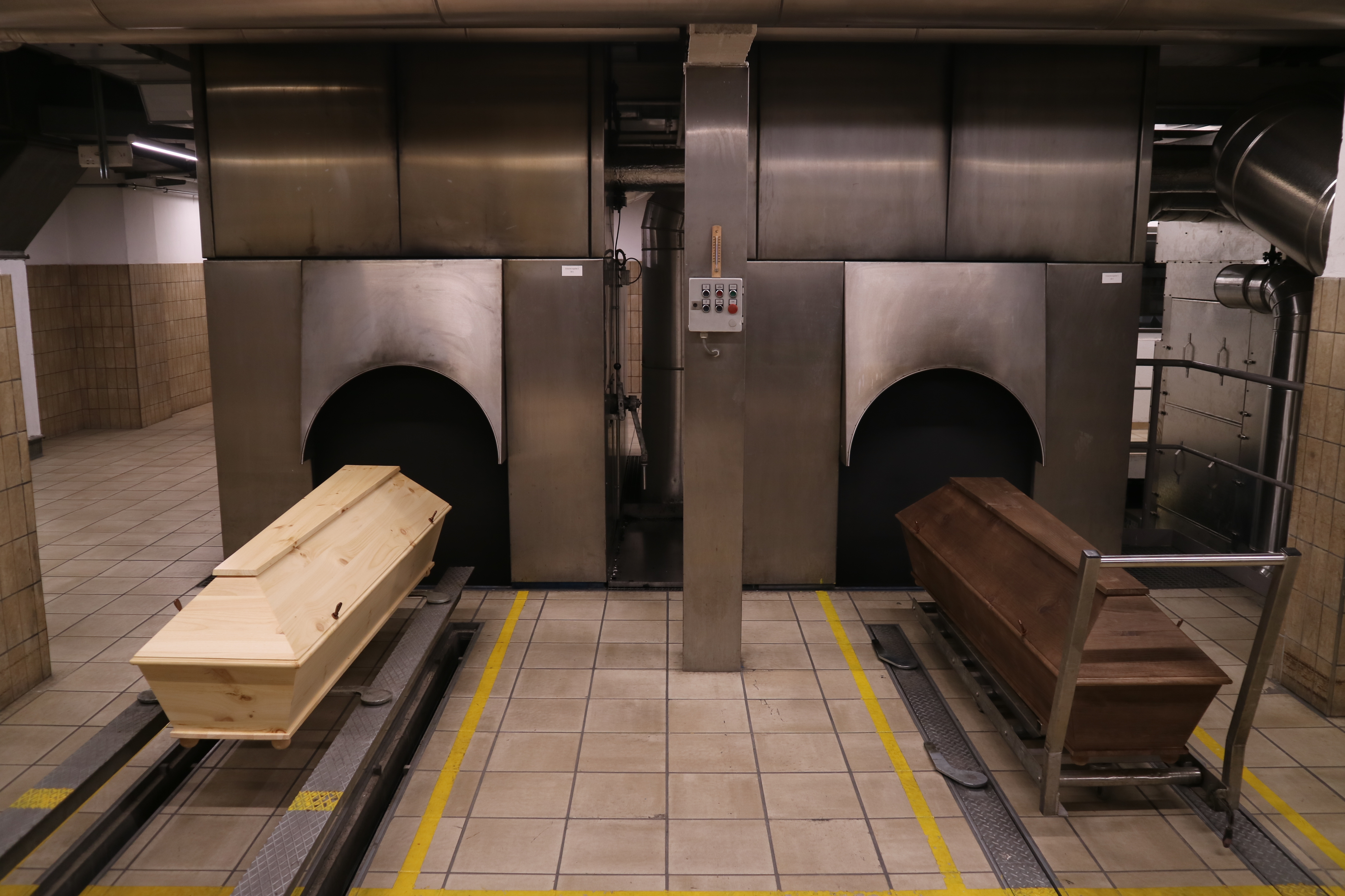 Elektrische Krematoriumsöfen der Feuerhalle Simmering